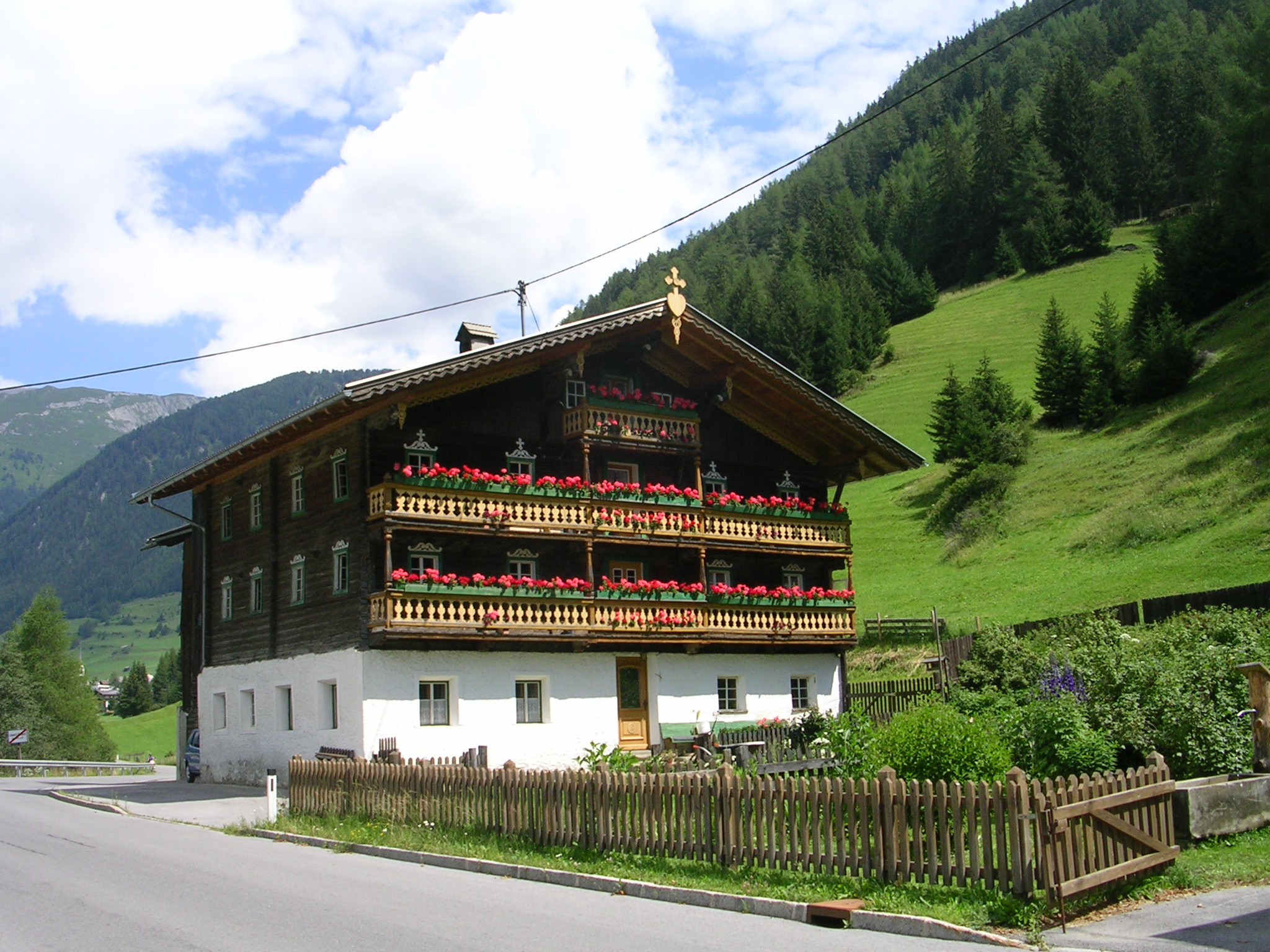 Lesach (Fraktion der Gemeinde Kals am Großglockner). Im Bild der Weiler Pradell mit dem Hof Meilinger This media shows the remarkable cultural object in the Austrian state of Tyrol listed by the Tyrolean Art Cadastre with the ID 17605. (on tirisMaps, pdf, more images on Commons, Wikidata)